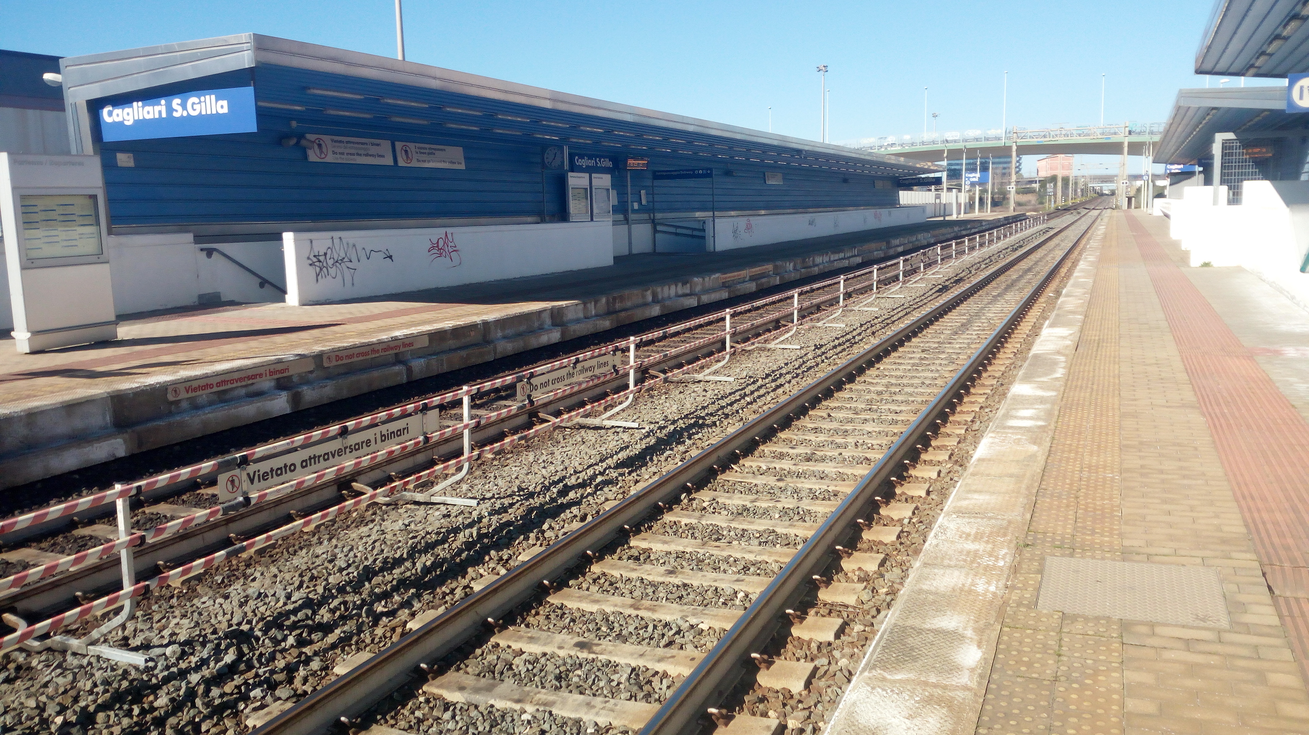 Vista verso Nord del binario 1 della stazione di Cagliari S. Gilla.